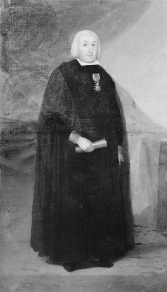 Retrato del magistrado español de origen aragonés José de Cistué y Coll (1723-1808).